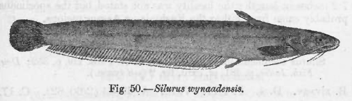 Silurus wynaadensis = Pterocryptis wynaadensis (Day, 1873)